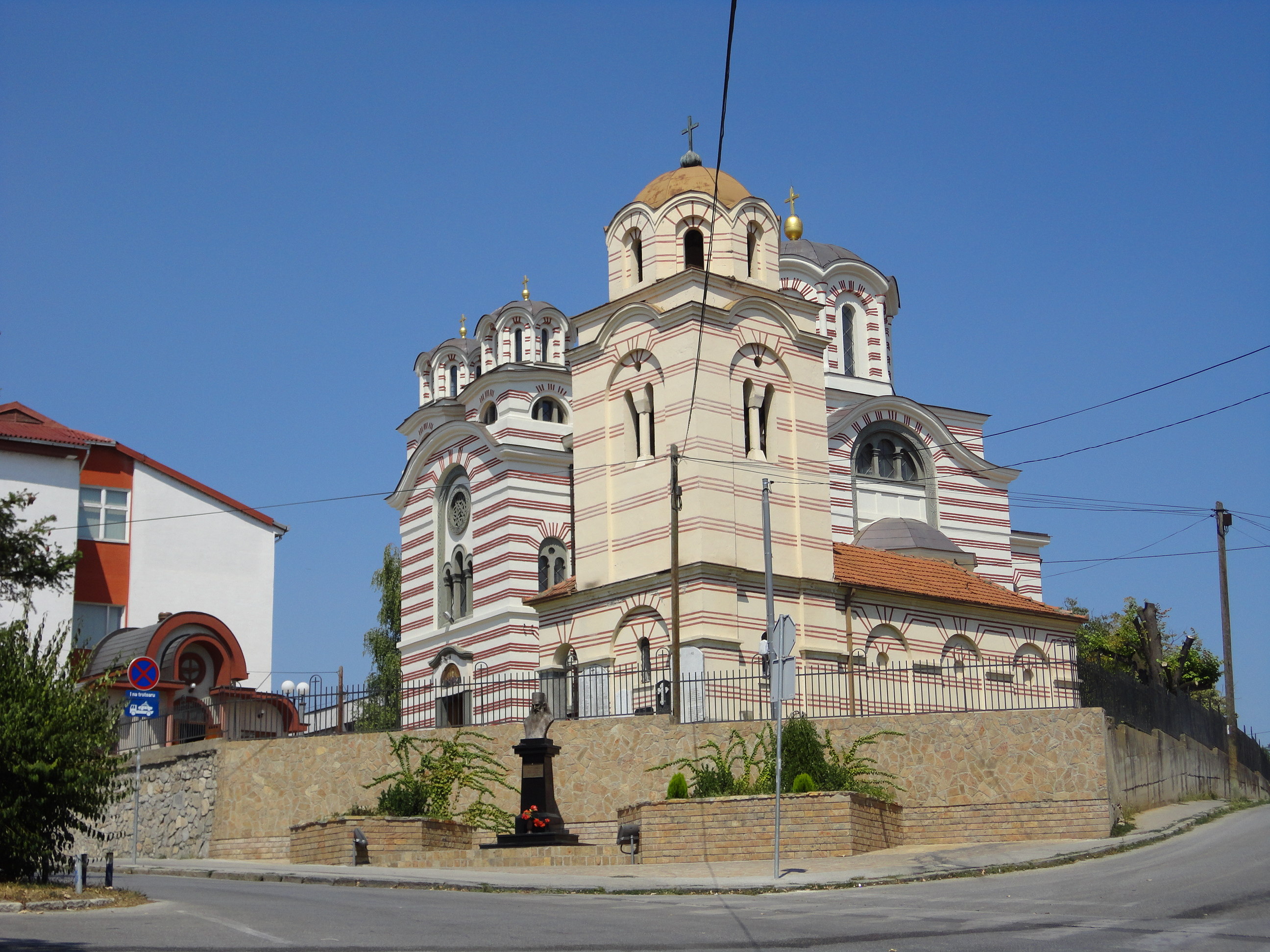 Црква Успења Пресвете Богородице